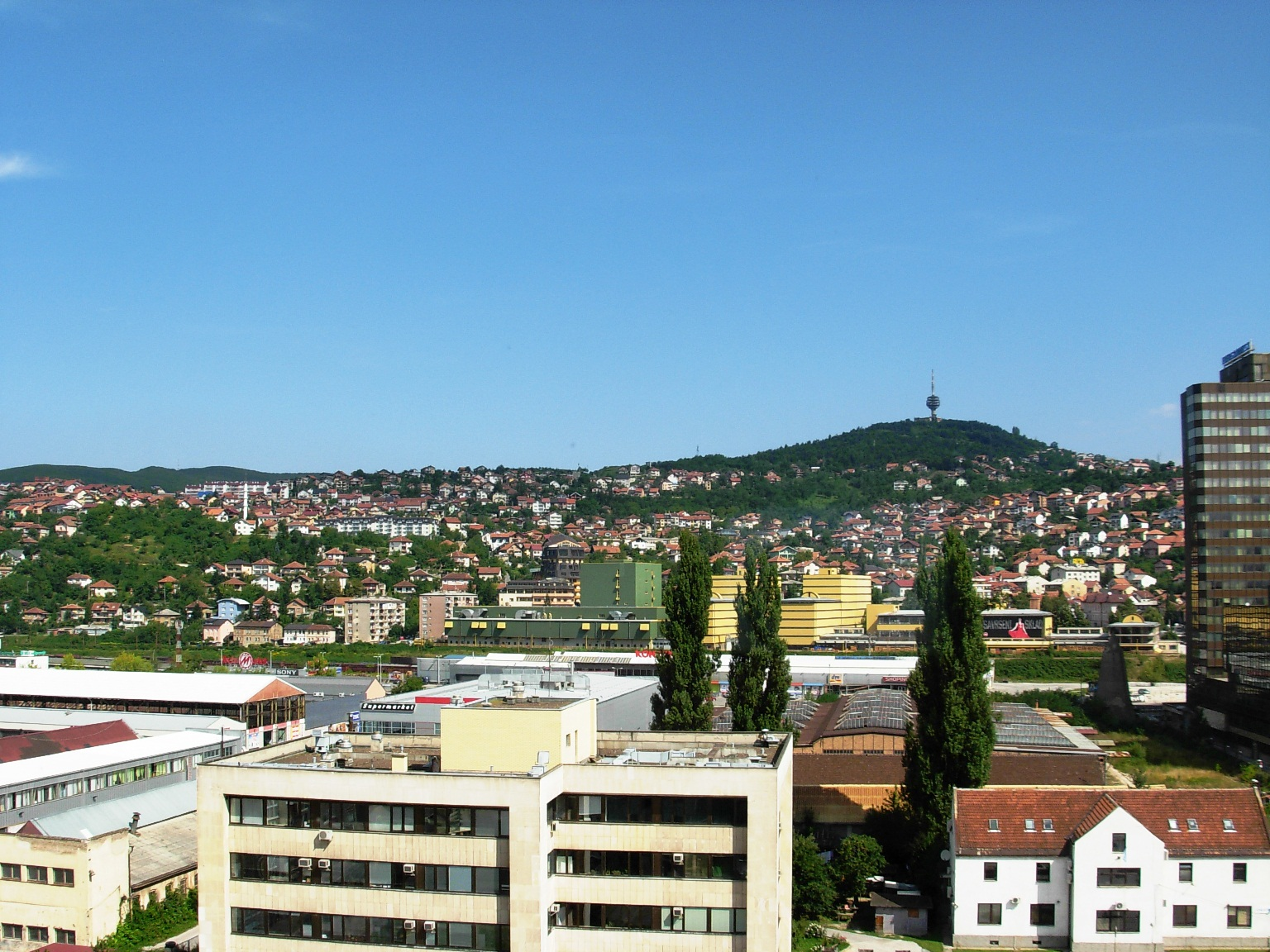 Pogled na Pofaliće,Sarajevo,avgust 2011